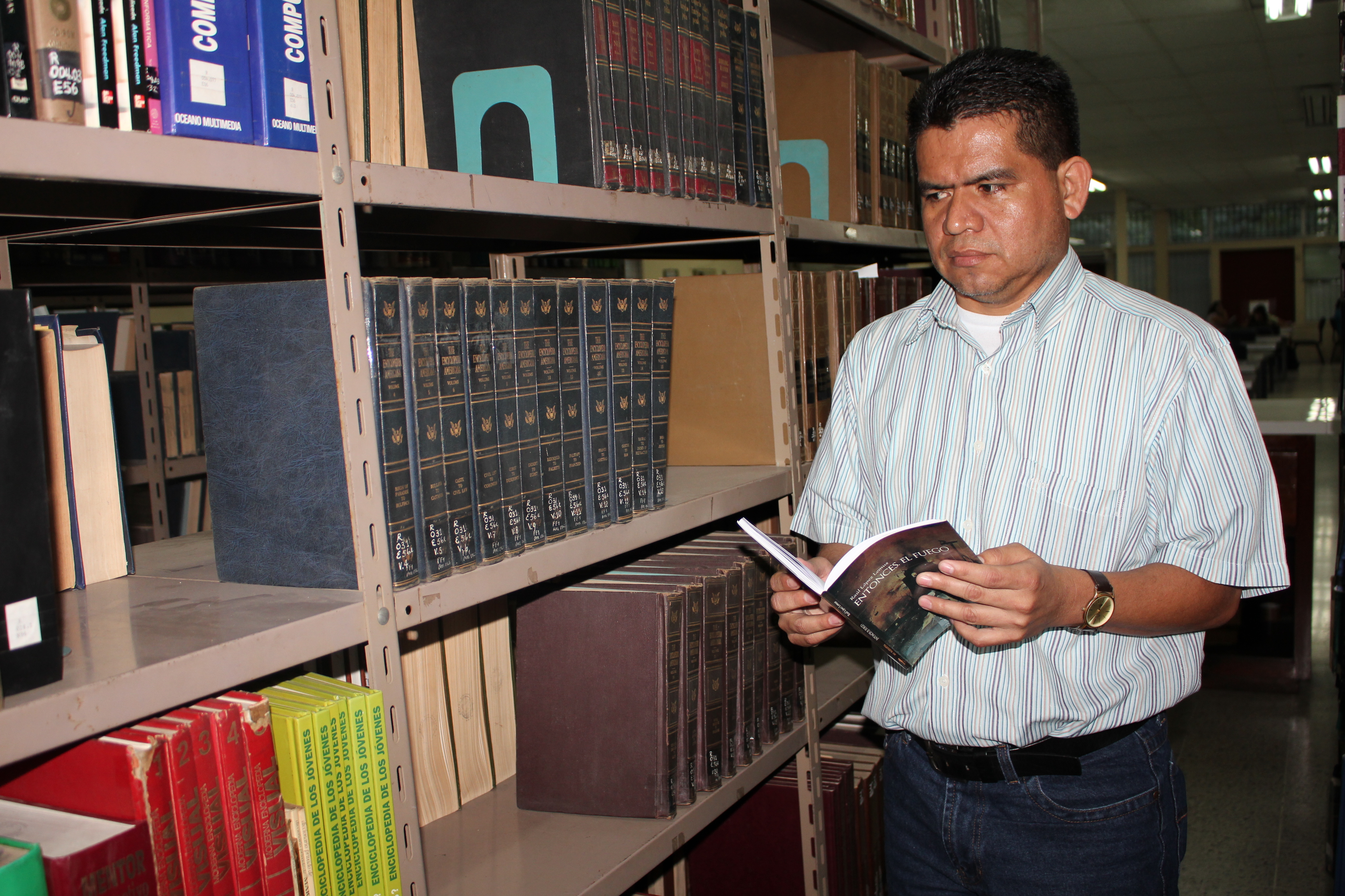 Raúl López Lemus en la Biblioteca de la UNAH-VS.